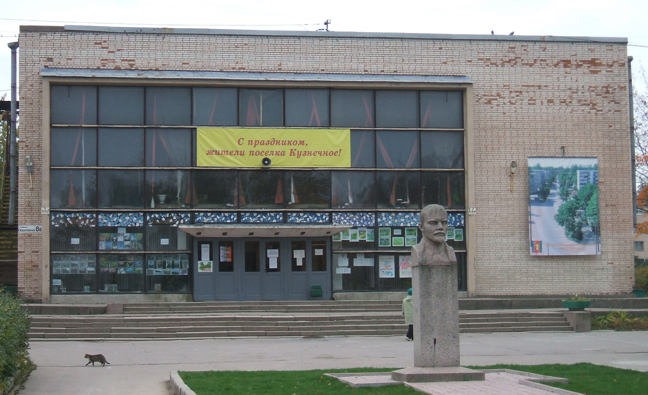 виды п.Кузнечное Лен.обл.